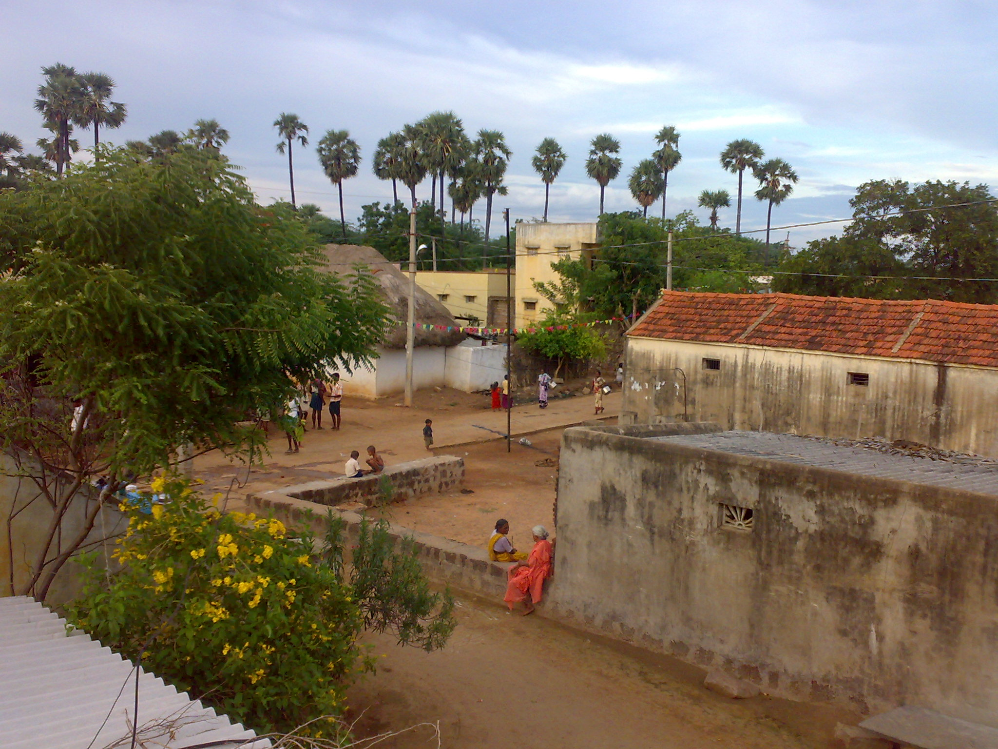 A view of the village from the roof top of a building